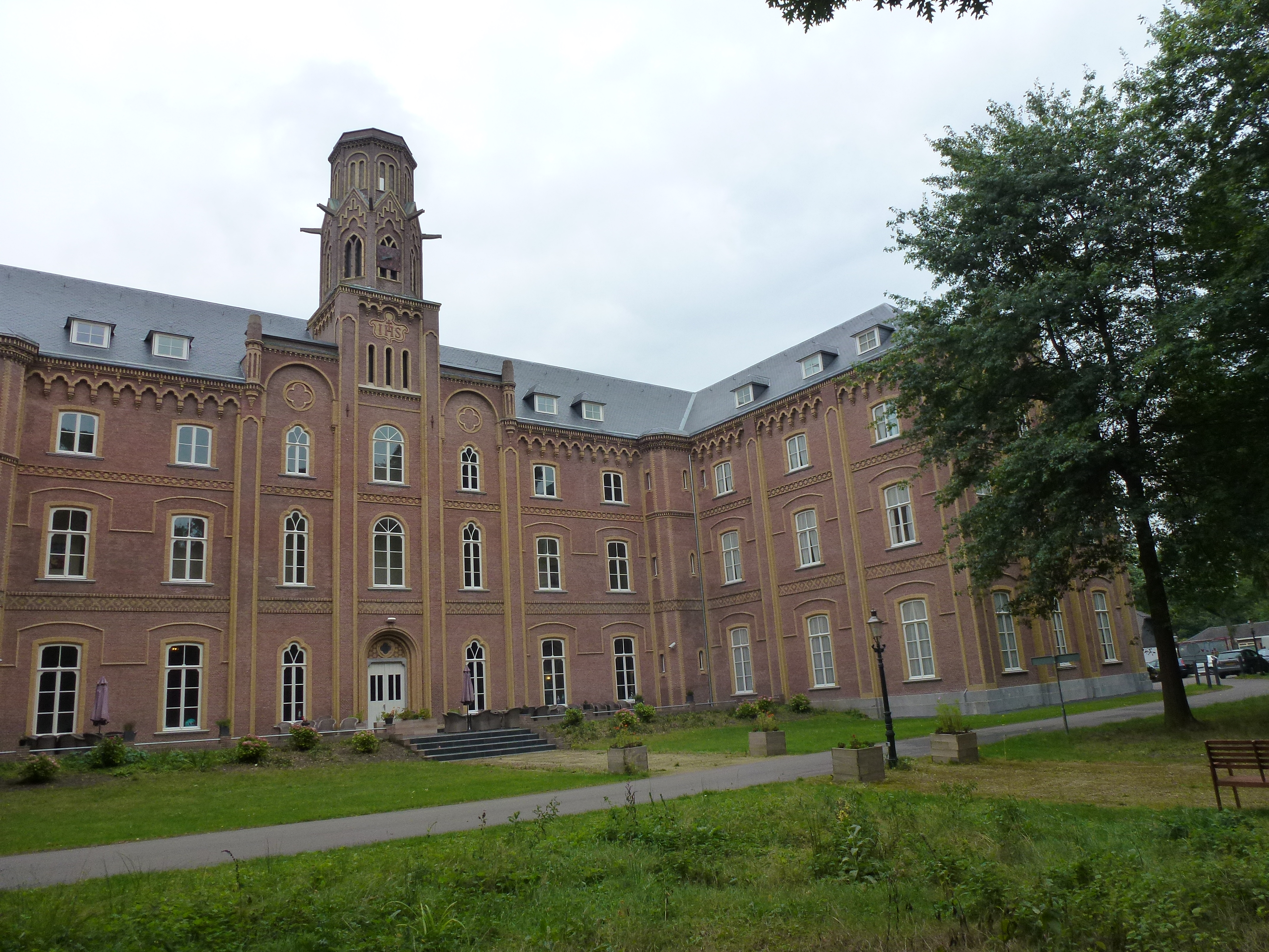 Velp Rijksmonument 514138 Mariendaal (Bronckhorst) na restauratie, voorkant